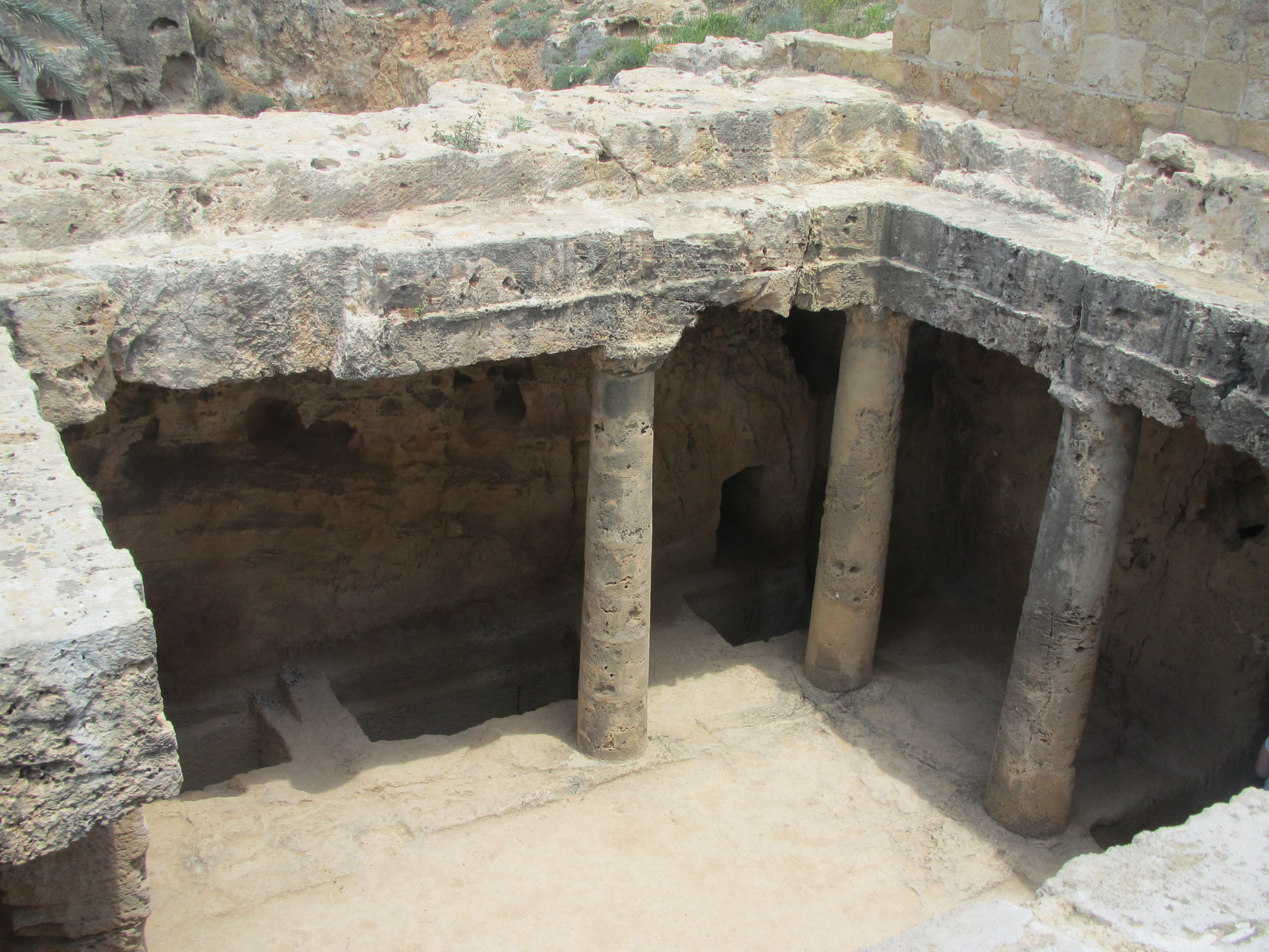 Tombs of the Kings by Paride